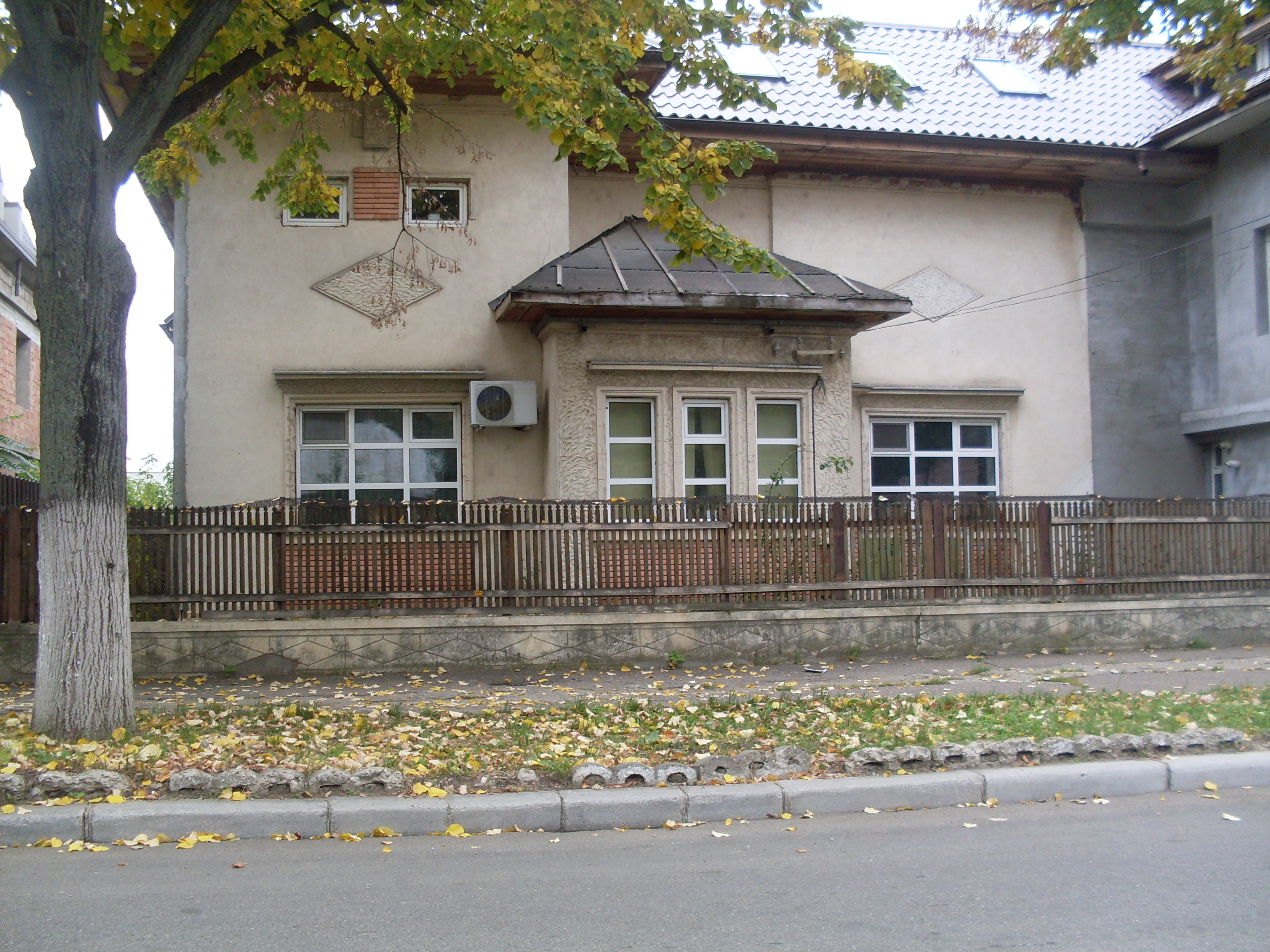 Casa Bulevardul Victoriei Nr.29